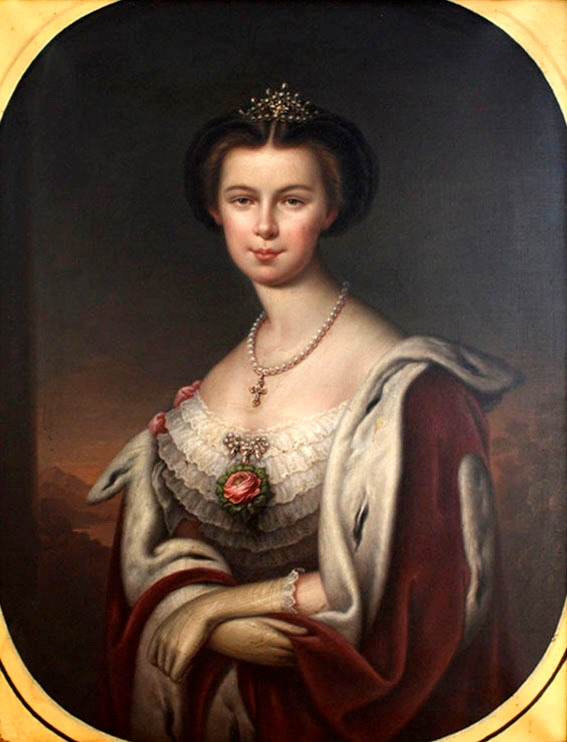 Königin Elisabeth